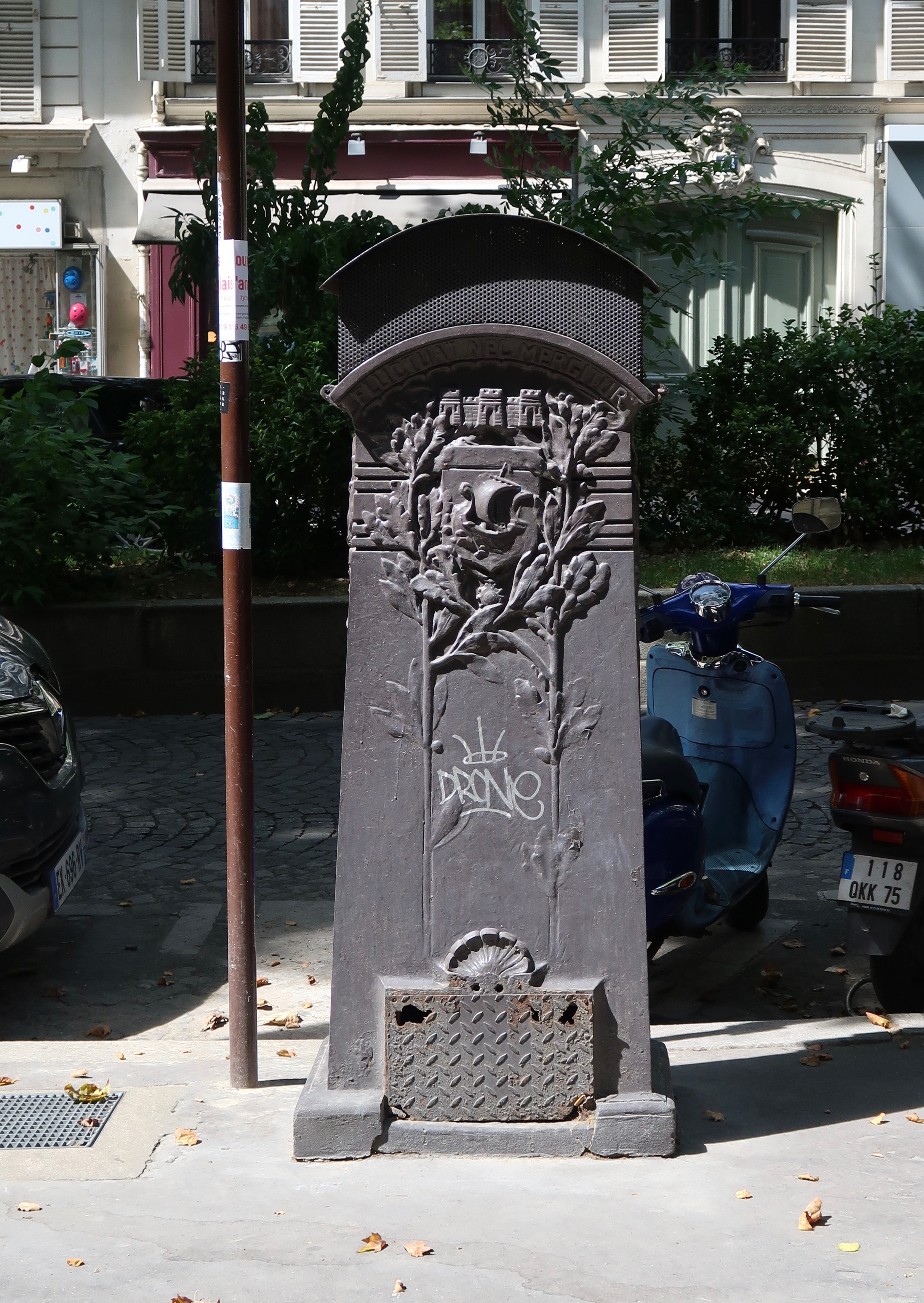 Boîte à sable, avenue Trudaine (Paris, 8e).